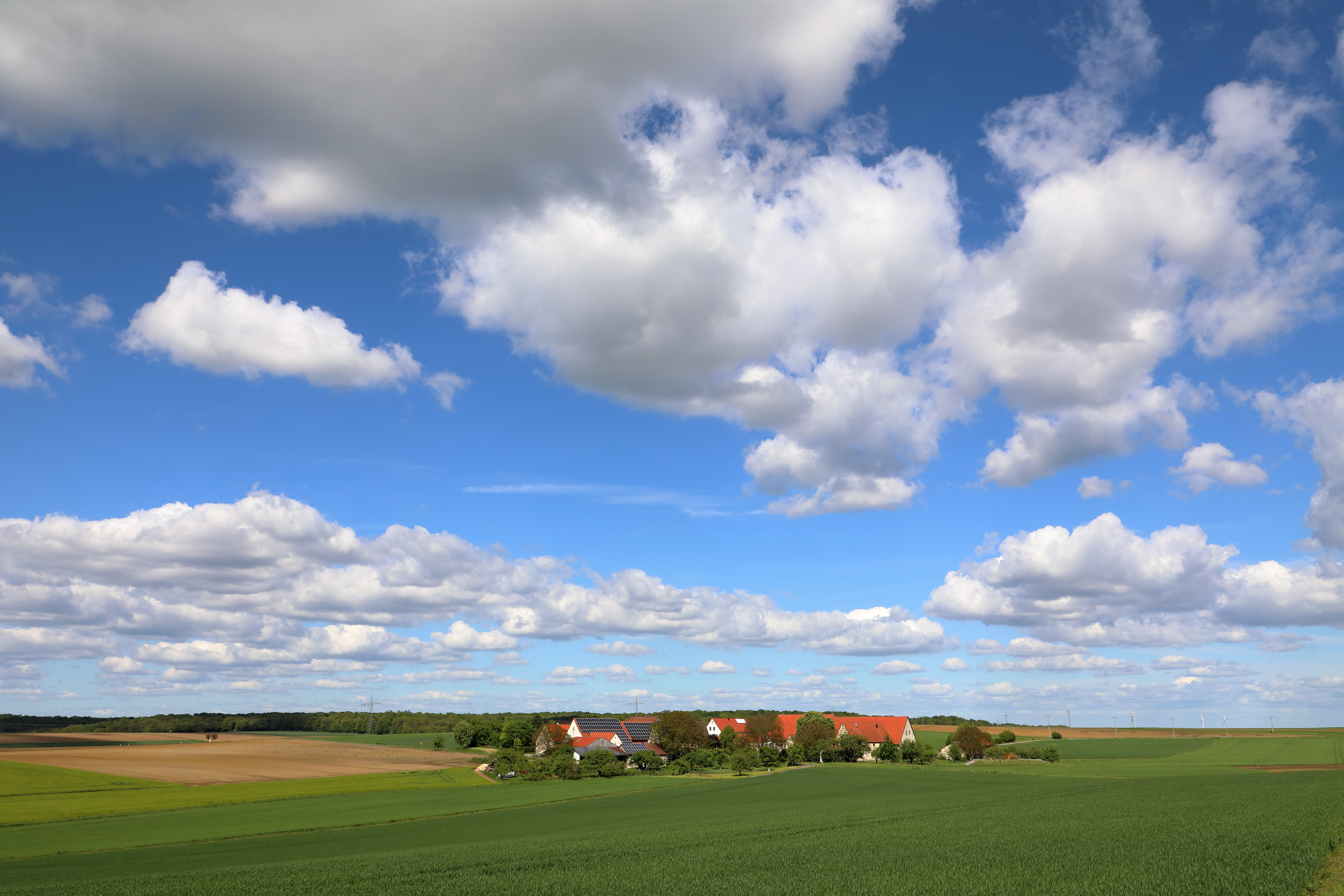 Bowiesen ist eine Exklave des Ortsteils Bernsfelden der Gemeinde Igersheim im Nordosten Baden-Württembergs.